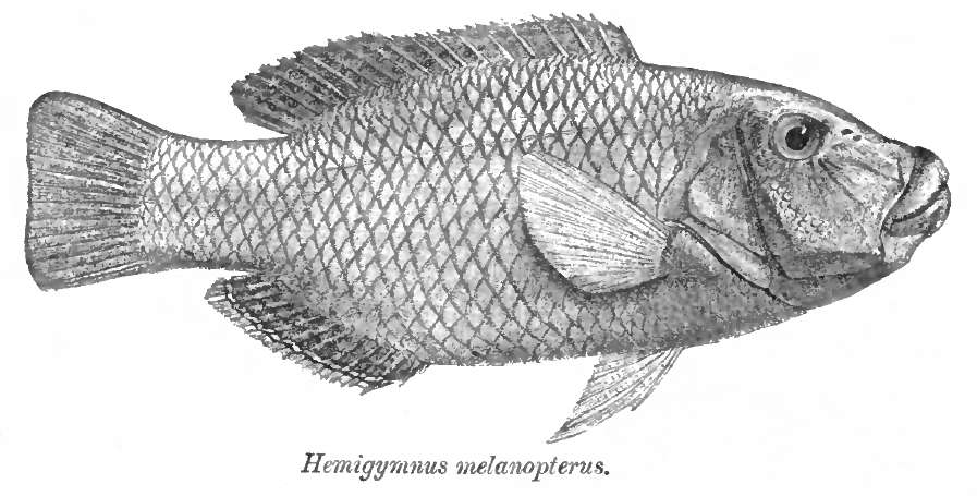 Hemigymnus melanopterus [sic] = Hemigymnus melapterus (Bloch, 1791)